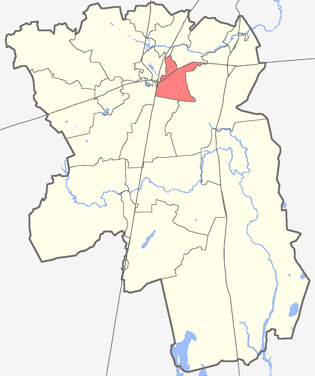 Новосветское сельское поселение на карте Гатчинского района